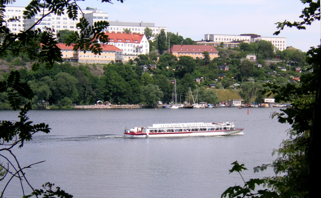 Blick över Årstaviken